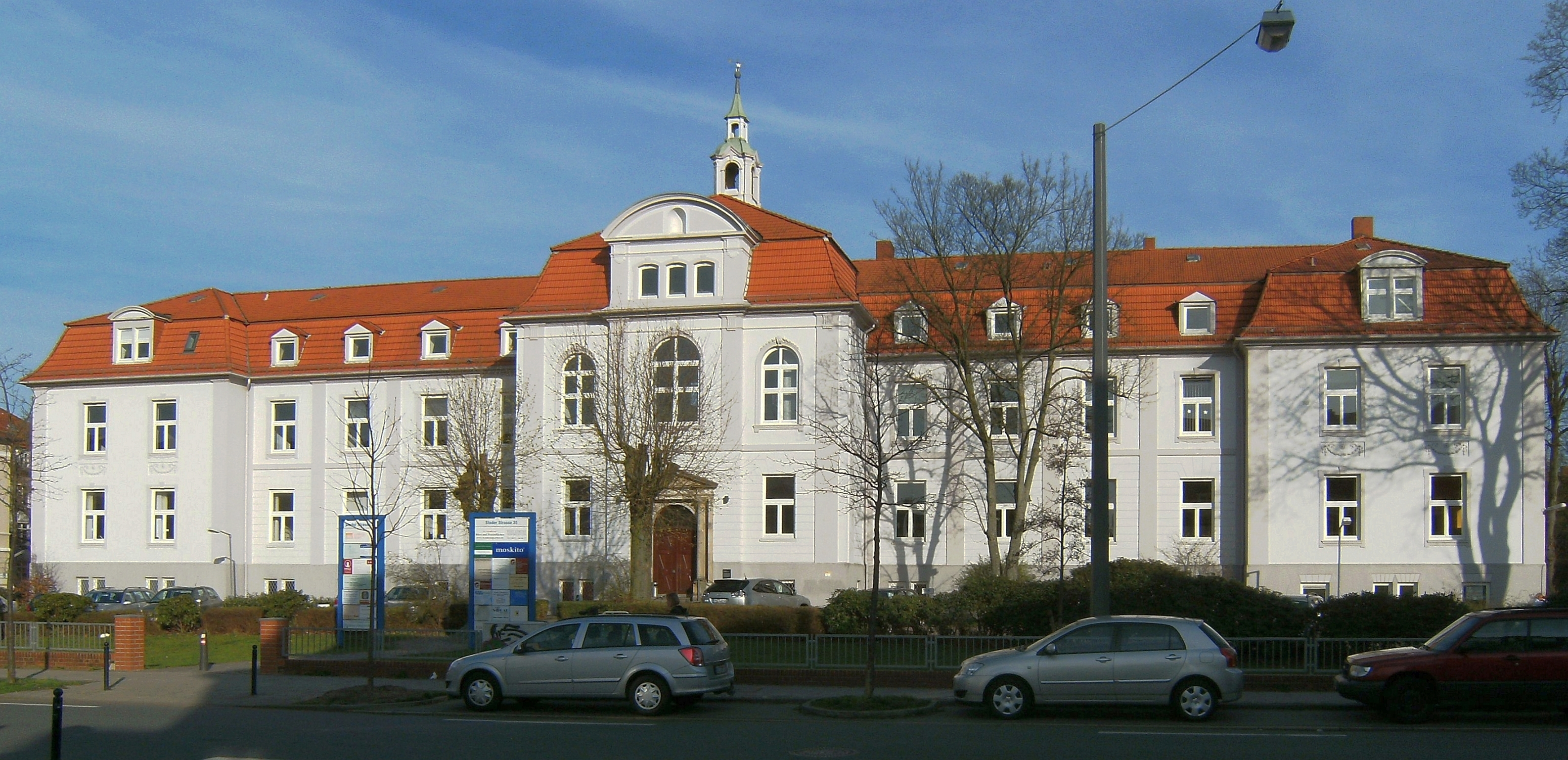 St.-Petri-Waisenhaus in Bremen, Stader Straße 35. Das abgebildete Objekt ist ein geschütztes Kulturdenkmal in der Freien Hansestadt Bremen, mit der Nr. 0044 beim Landesamt für Denkmalpflege registriert.